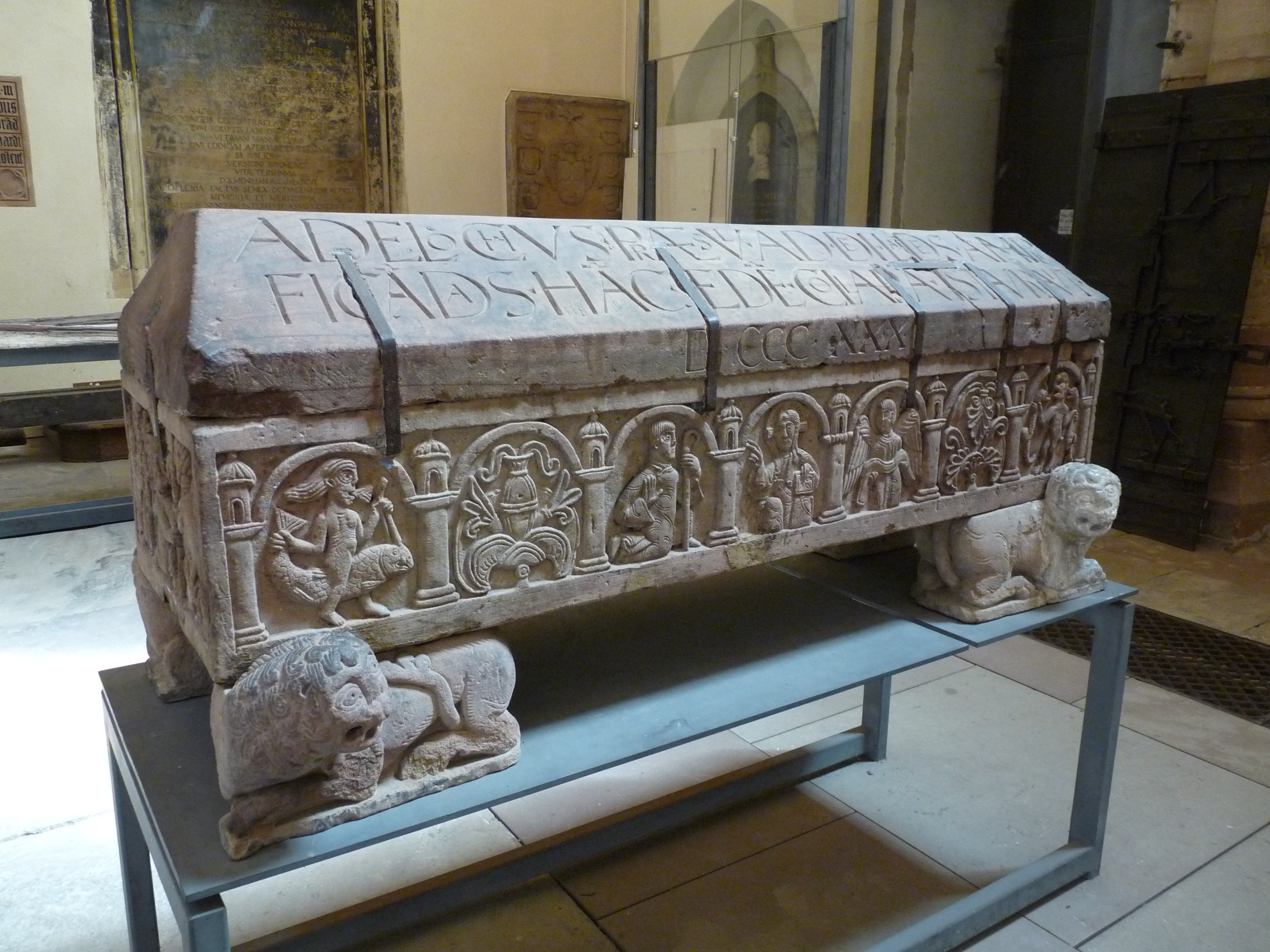 Sarcophage d'Adeloch à l'église Saint-Thomas de Strasbourg (12e siècle)